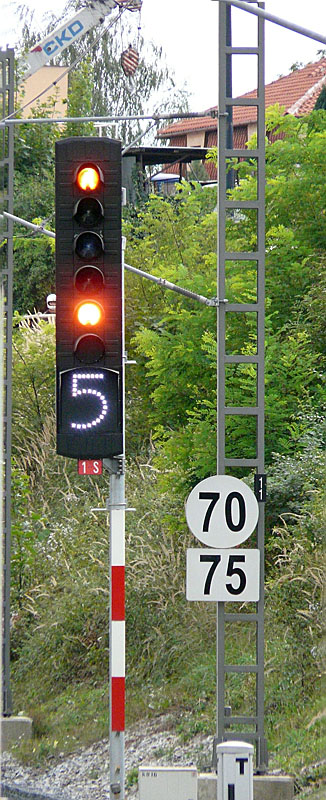 Návěstidlo s proměnným indikátorem rychlosti PUR ve stanici Benešov